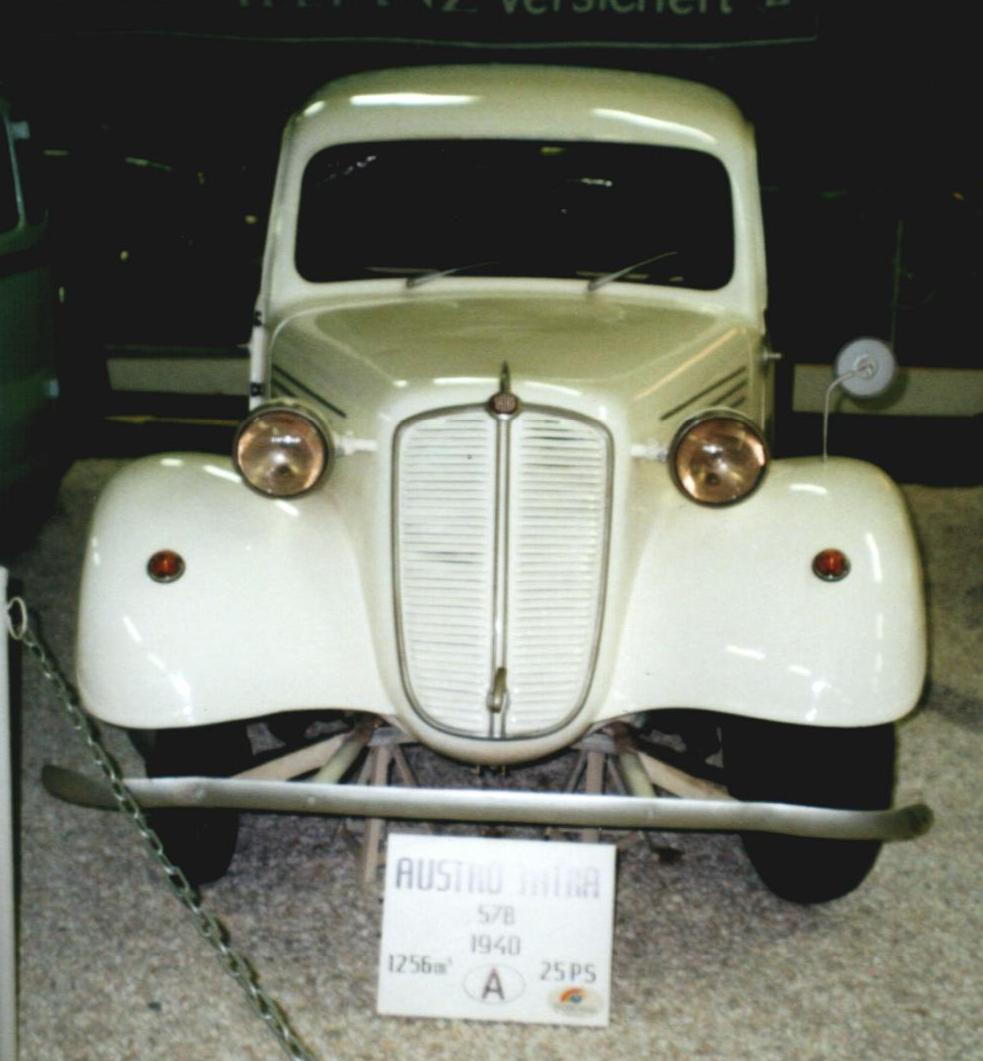 Tatra 57 B von 1940